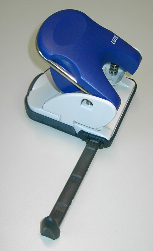 Standard-Zweifachlocher mit ausziehbarer Anschlagsleiste.